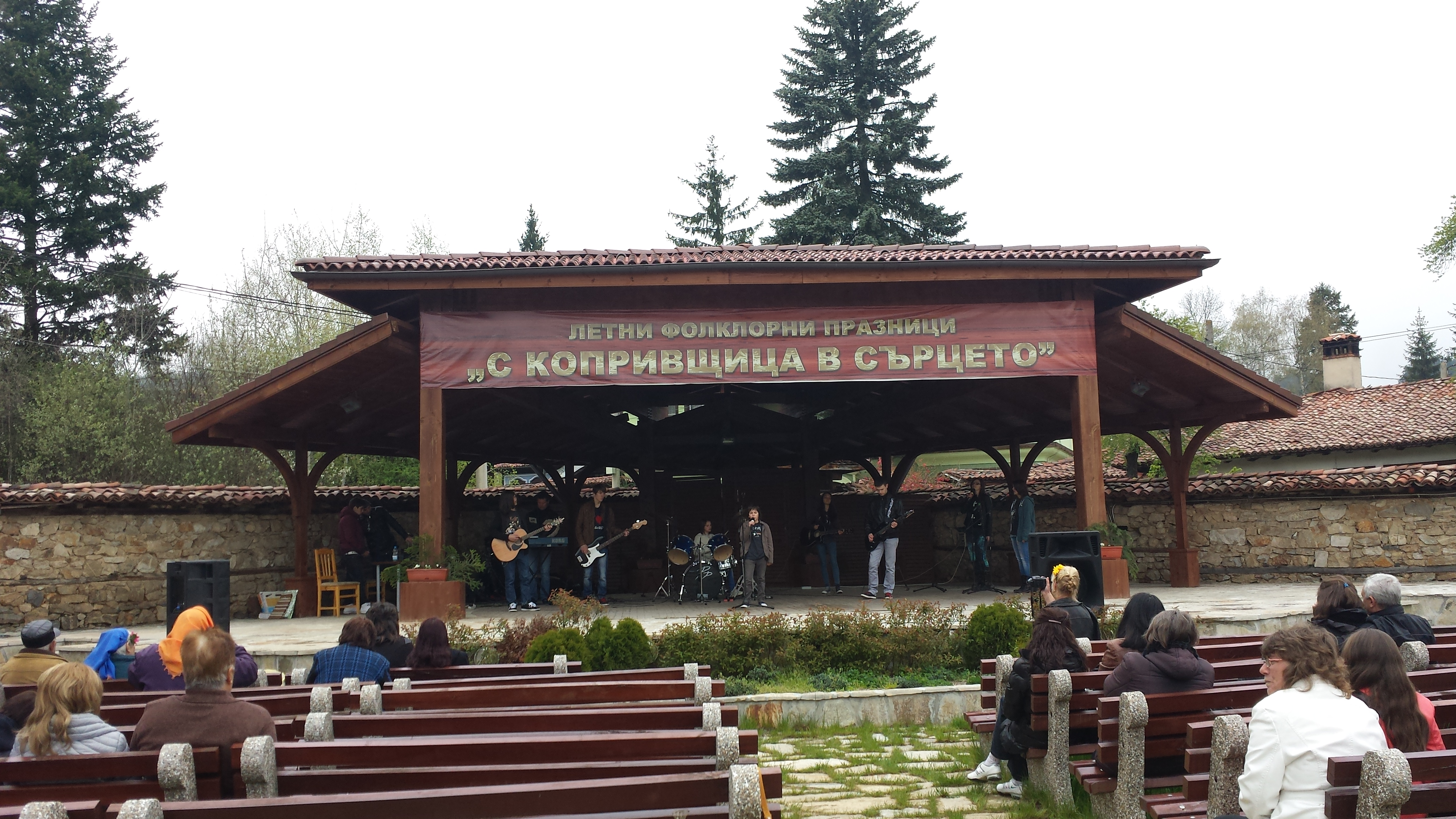 Централната естрада